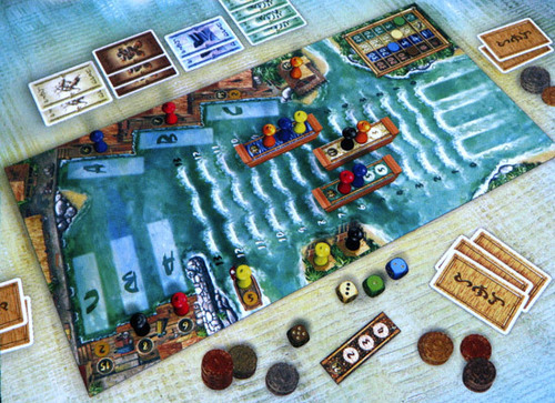 Jeu de société Manila